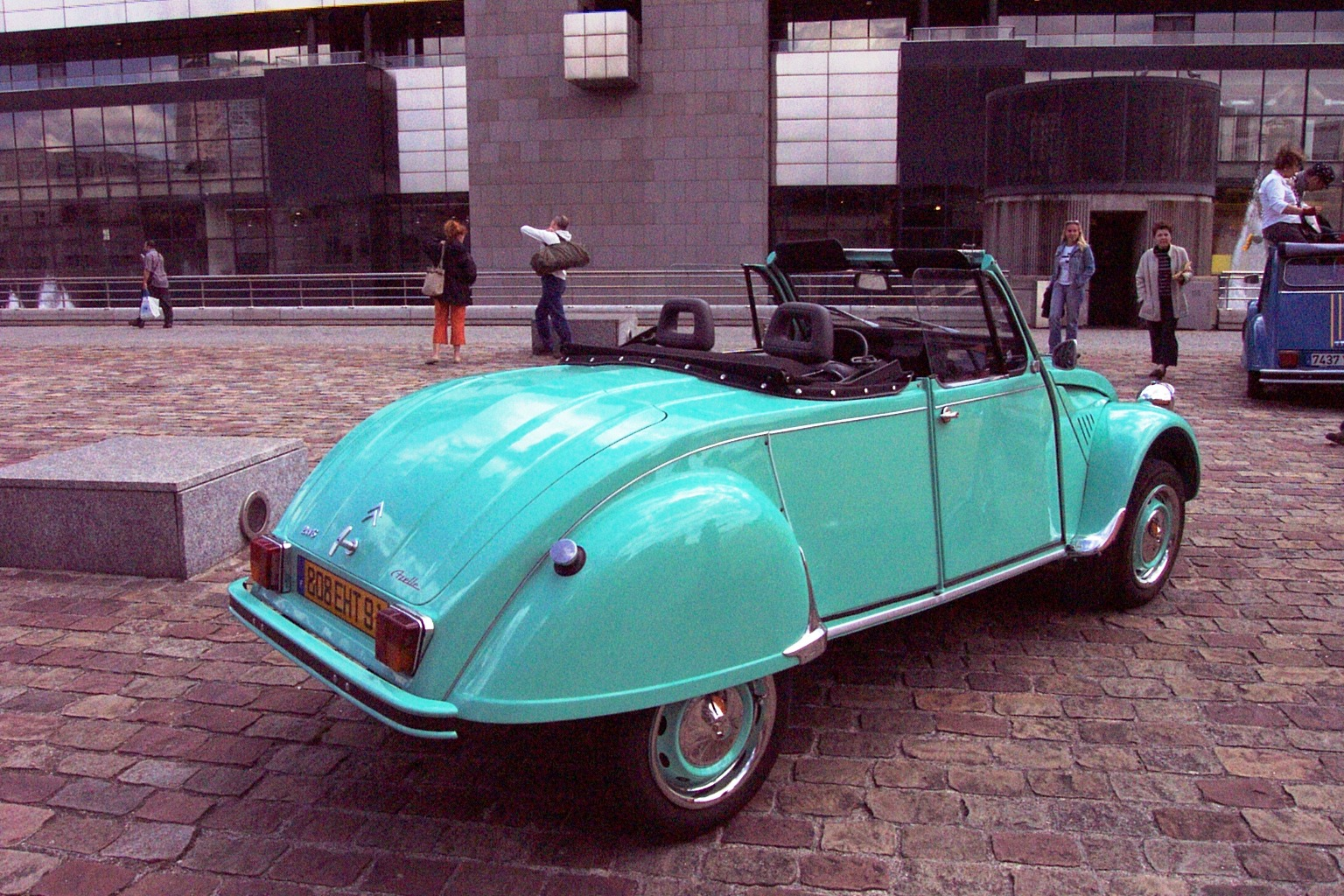 Cabriolet Azelle sur base 2cv citroen